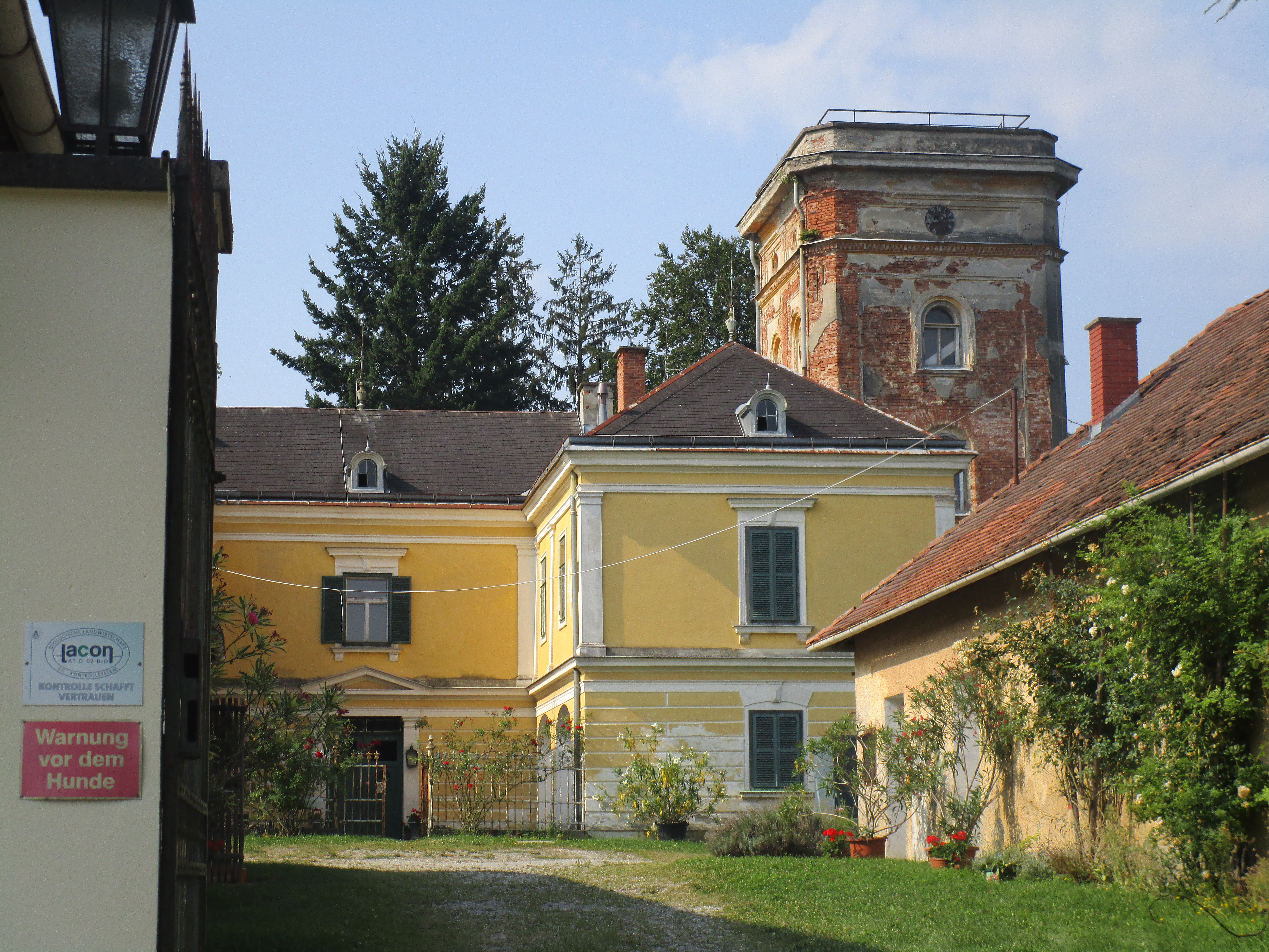 Schloss Pfeilerhof mit Turm und Vorhof (von Nordosten)